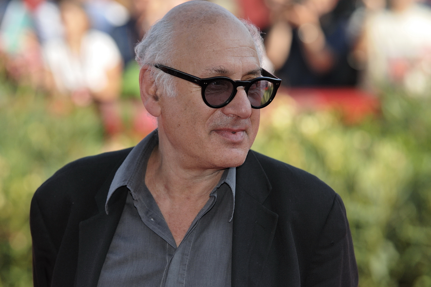 66ème Festival du Cinéma de Venise (Mostra), 10ème jour (11/09/2009) Tapis rouge avec Jared Leto, Diane Kruger, Sarah Polley et le réalisateur Jaco Van Dormel pour le film : MR. NOBODY